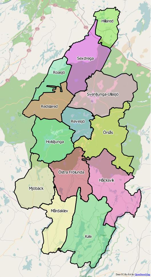 Distriktsindelningen i Sundsvalls kommun World file: 119.97366116294233507 0 0 -119.97366116294233507 1419998.13336638151668012 7902524.25770745798945427